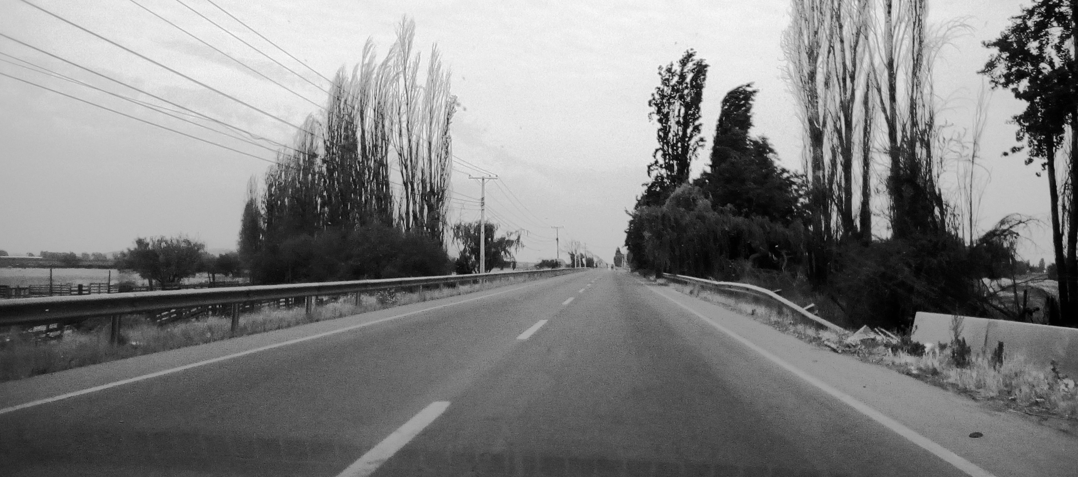 Ruta G-16 (Camino Lo Echevers), entre Santiago y Lampa, cerca de la parcelación Miraflores, Chile.